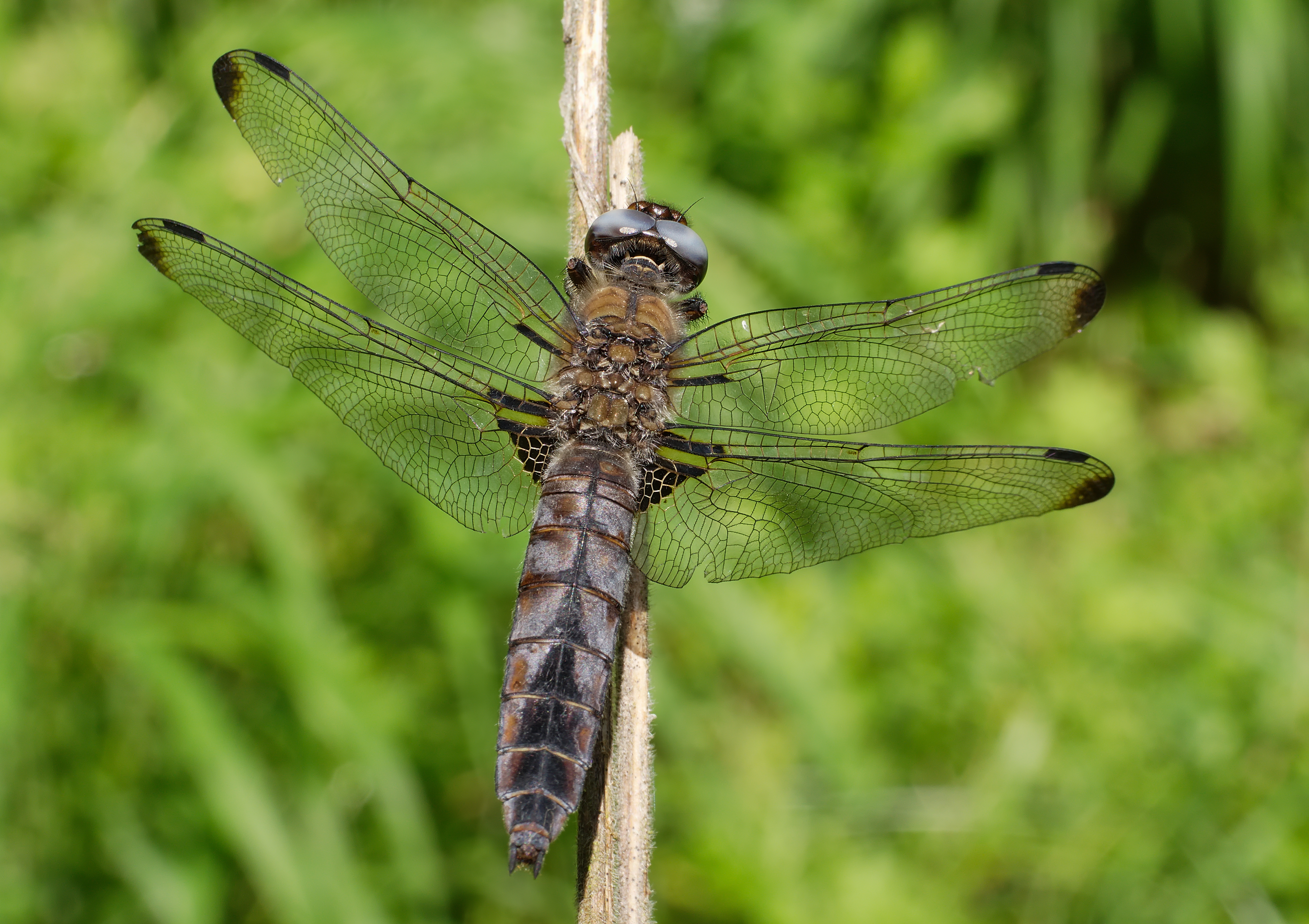 Spitzenfleck - Libellula fulva, Weibchen. Aufgenommen in Ahrensberg (Wesenberg), Mecklenburg-Vorpommern, Deutschland.